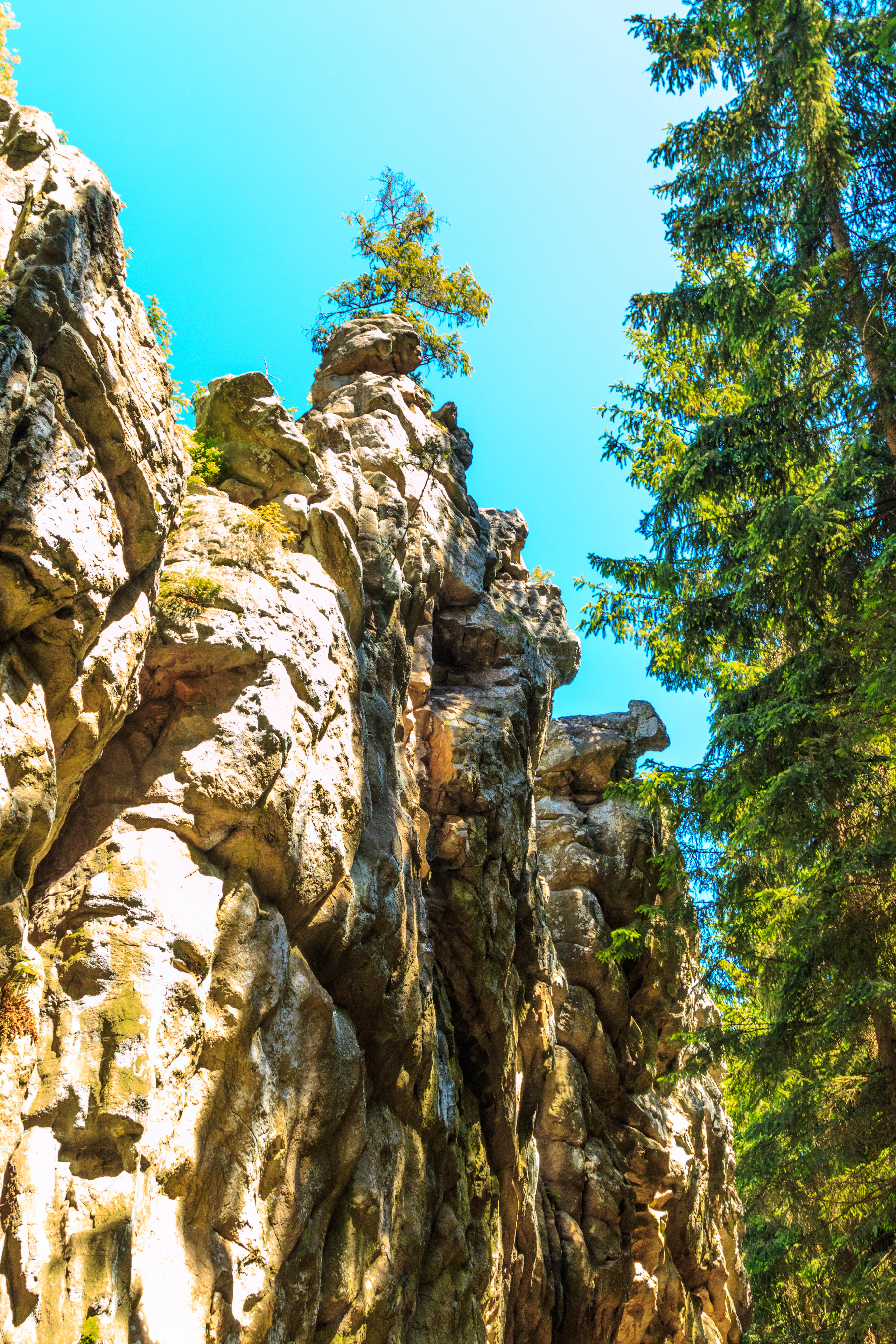 PP Černá skála (Žďárské vrchy) Project: Chráněná území.